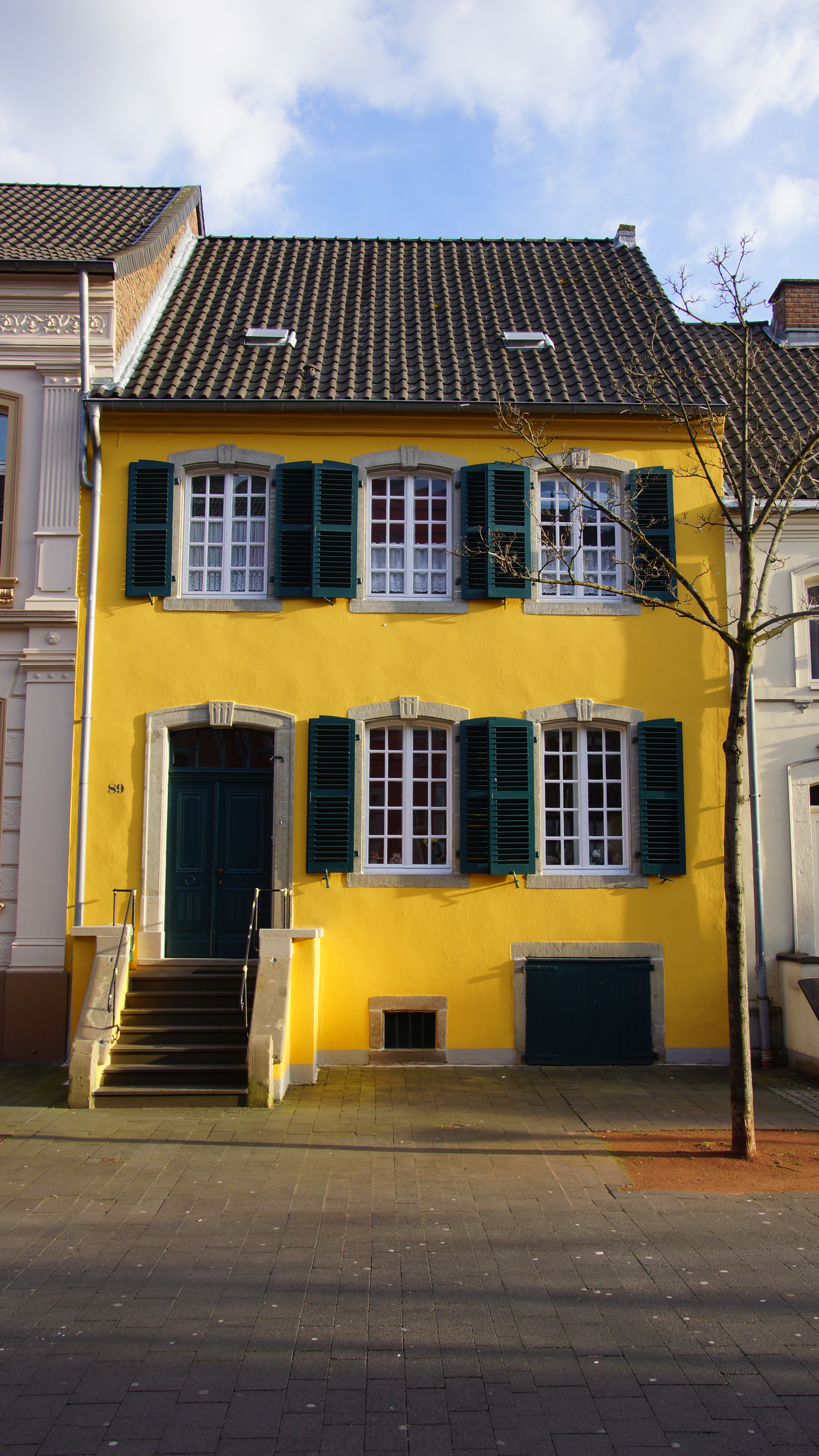 Baudenkmal Bartholomäus-Ehlen-Haus in Bergheim-Mitte, Hauptstraße 89 This is a photograph of an architectural monument.